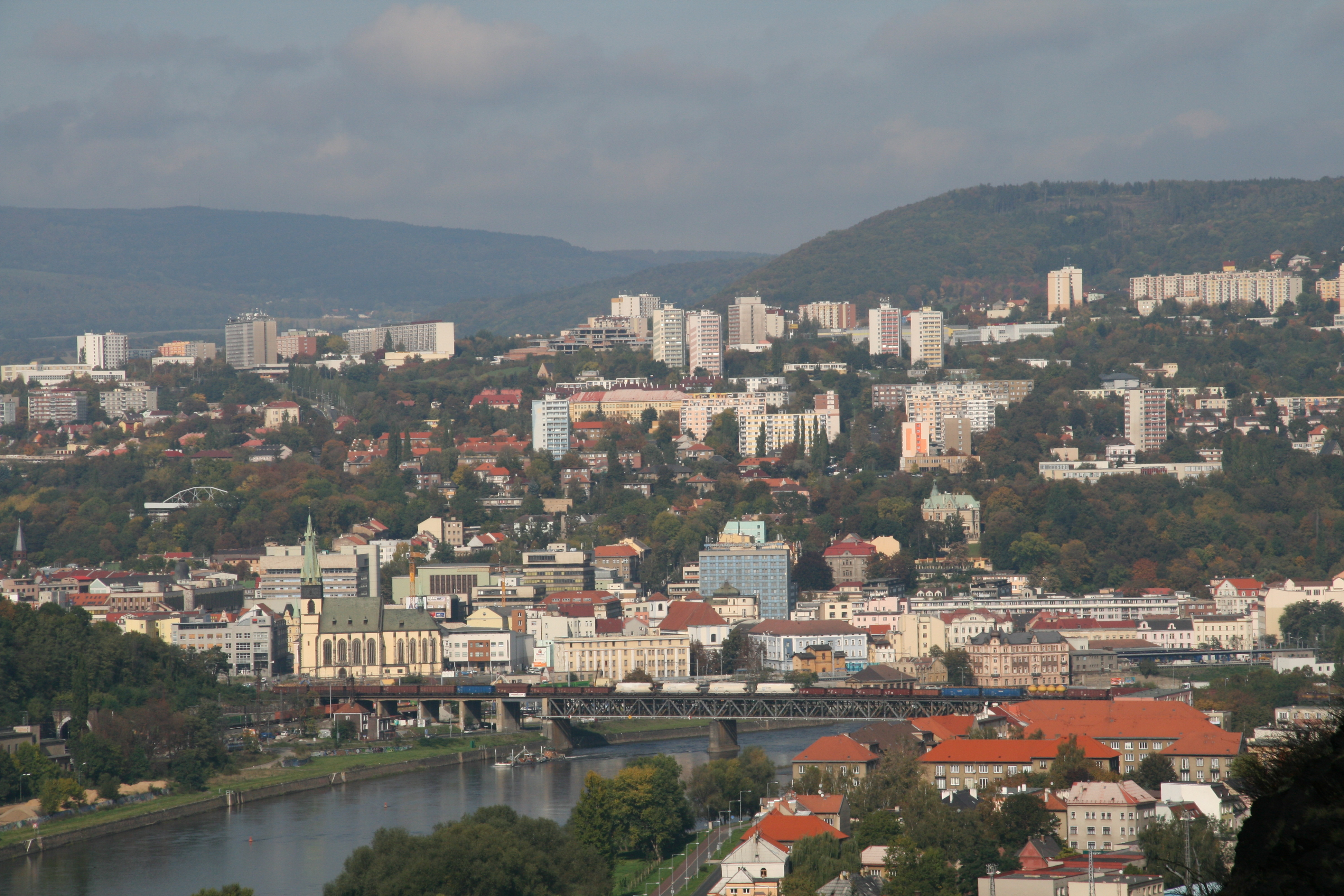 Panorama Usti nad Labem by Niederkasseler